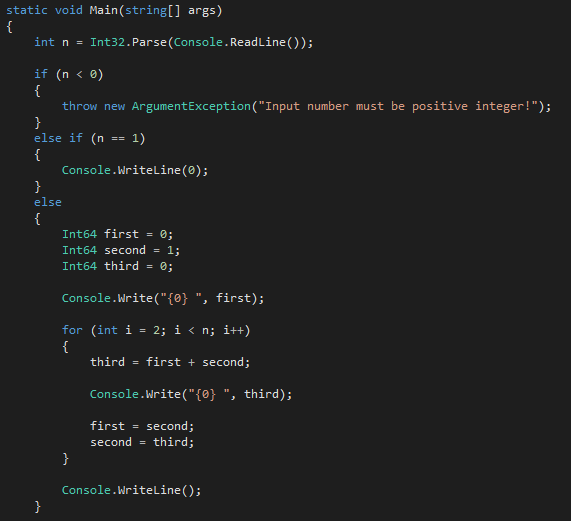 Програма която намира първите N на брой числа от редицата на фибоначи